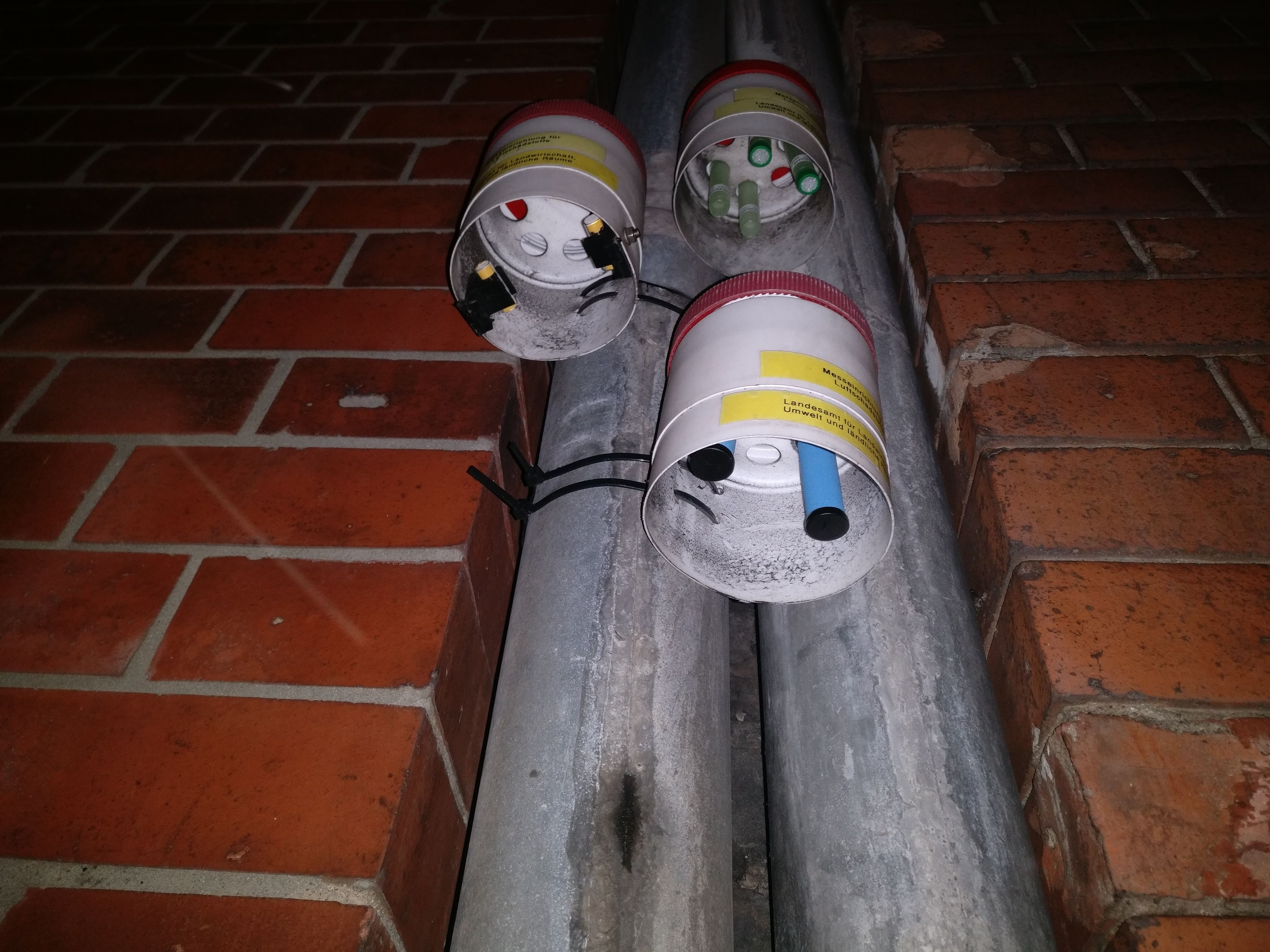 Die Luftmessstation an der B76 die durch die Dieselfahrverbote in den Medien ist.